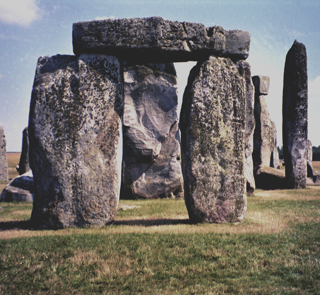 Stonehenge